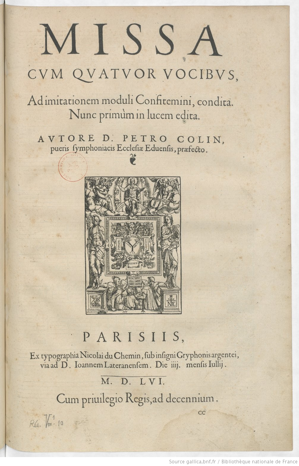 pages de titre de la missa Confitemini